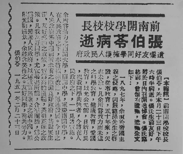 中文（中国大陆）: 1951年2月26日天津日报关于张伯苓病逝的简讯